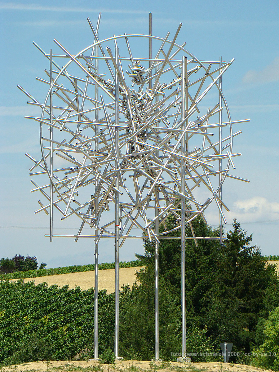 Uomo Universale (2007/08) von Gunther Stilling in Leingarten